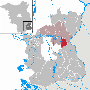 Heinersbrück in Brandenburg (Country) - District Spree-Neiße